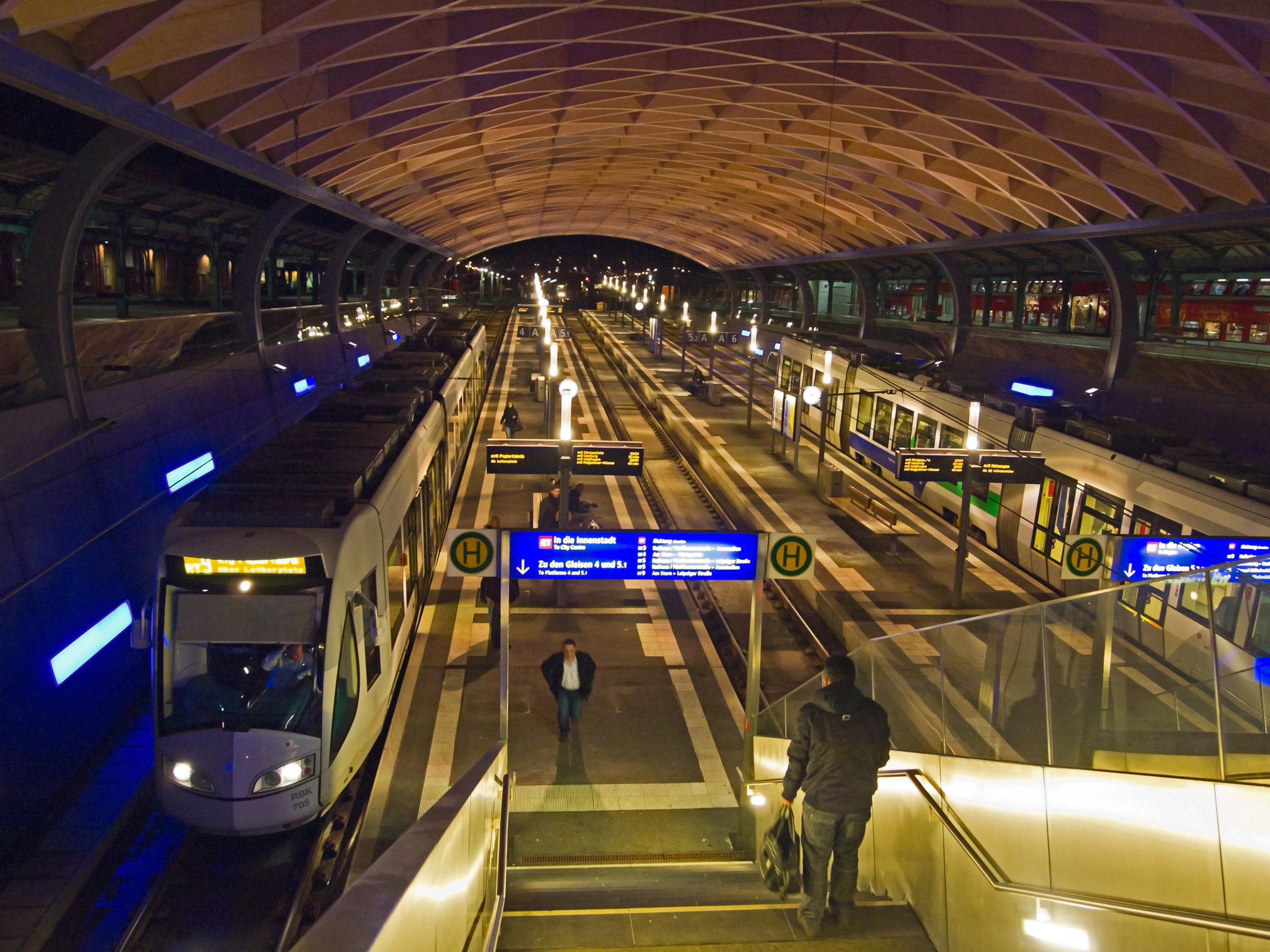 Hauptbahnhof Kassel mit den beiden tiefergelegten RegionTram-Bahnsteigen, die schräg in den Tunnel laufen. Rechts und links sieht man schwach die Bahnsteige der Regionalbahnen, rechts wartet der RegionalExpress nach Frankfurt. · (hellere Aufnahme)